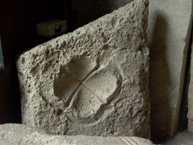 Cupule d'une soffite (musée lapidaire de Mozac - 63) Photo prise par Matthieu Perona (perso).